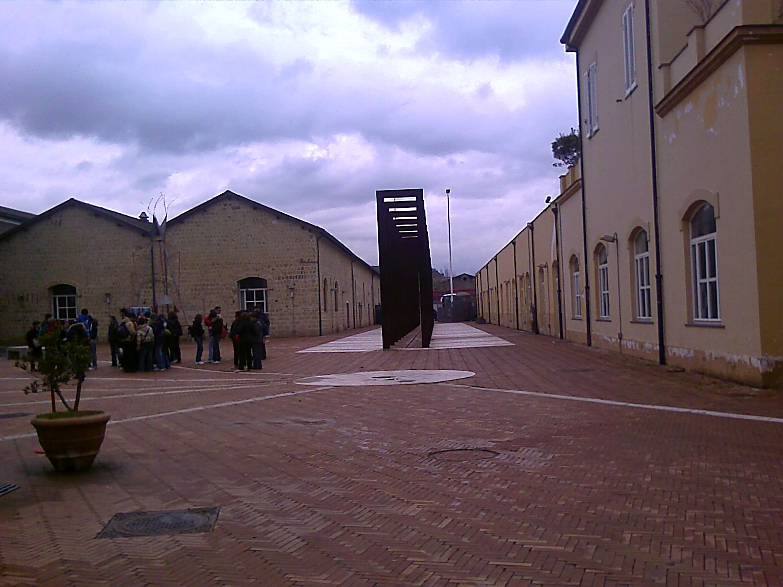 Città della Scienza's court